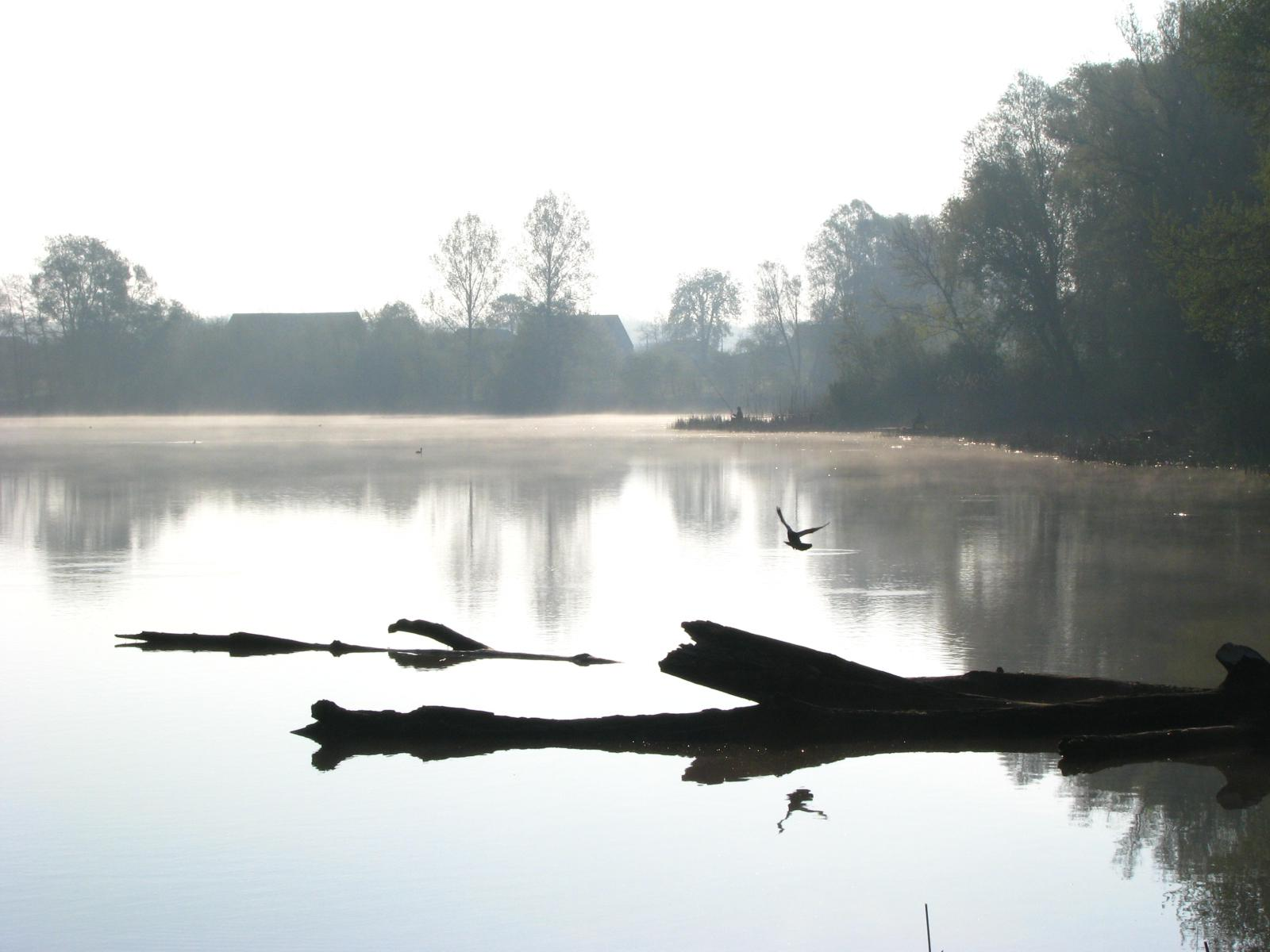 Okolice Wojcieszyc